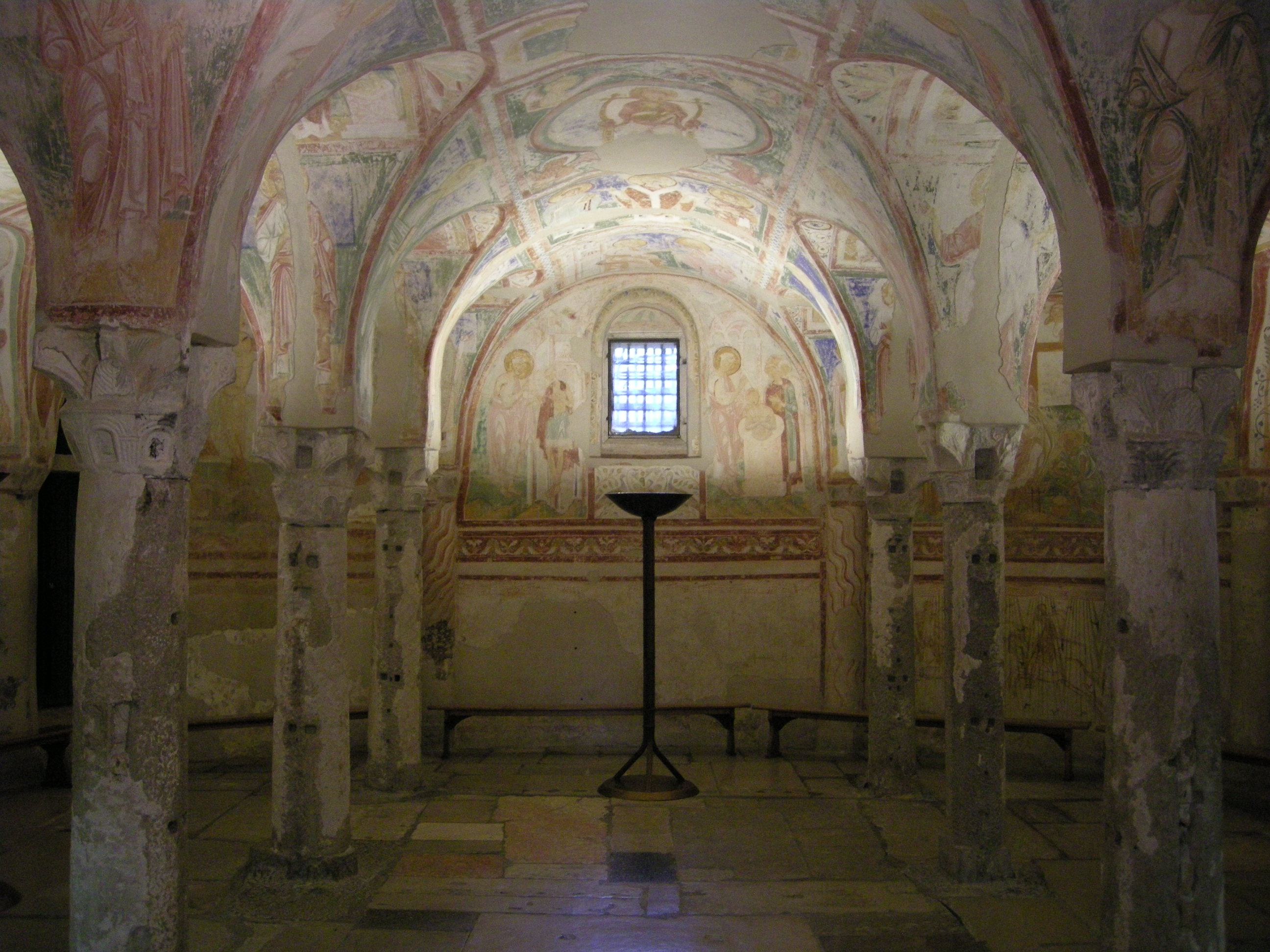 Basilica di aquilieia, cripta